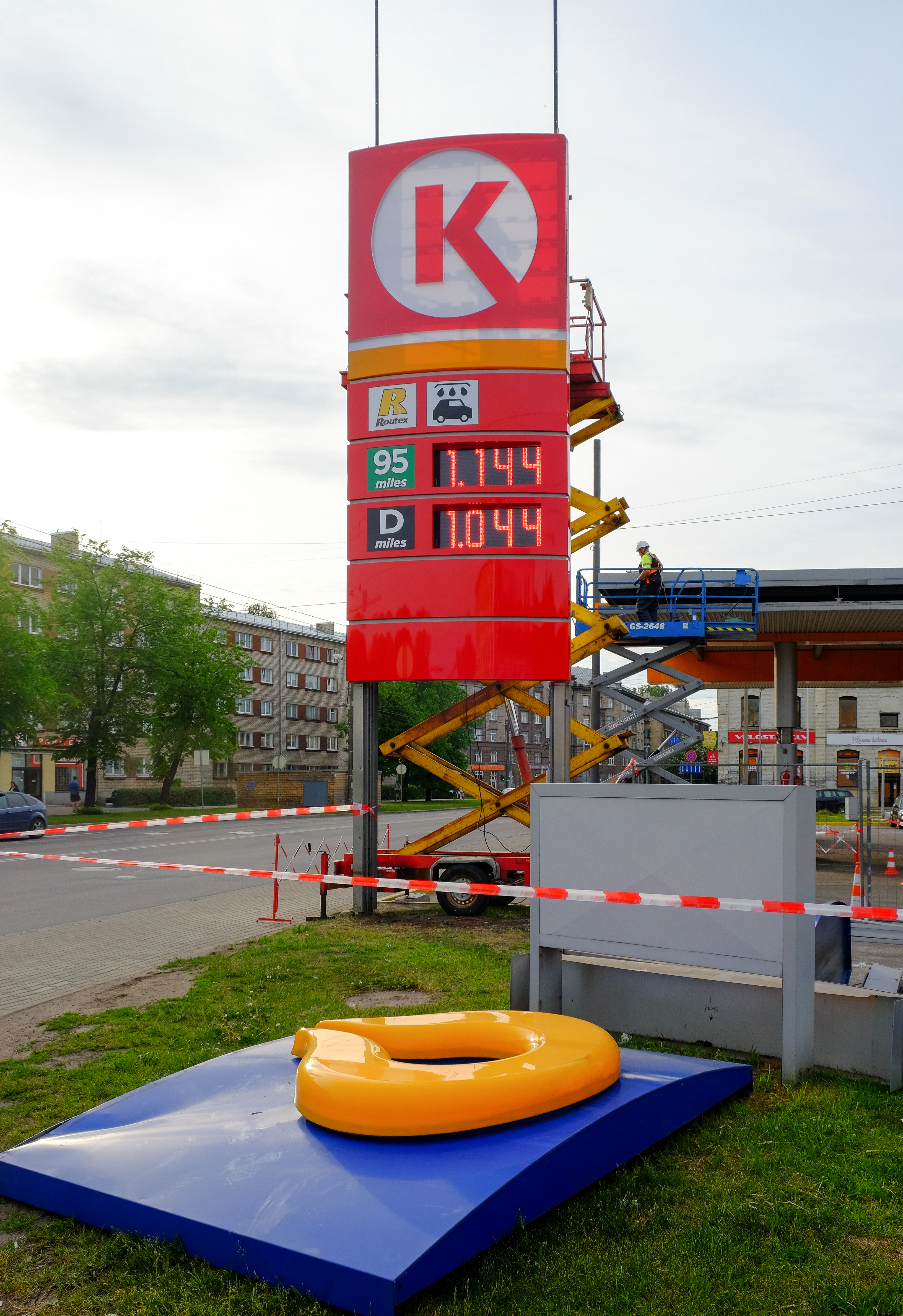 Circle K nomaina Statiol